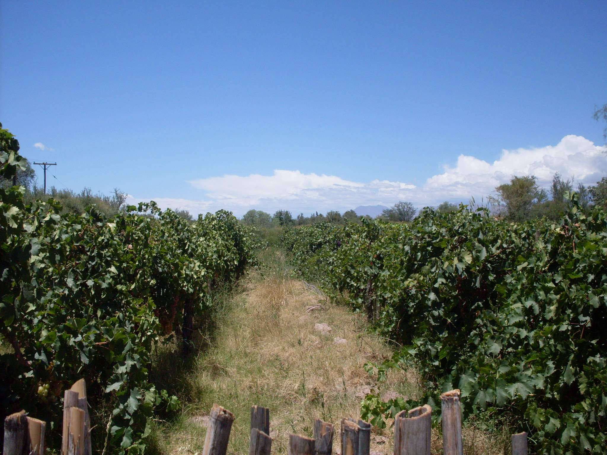 Viñedos Fiambalá, Catamarca, Argentina.